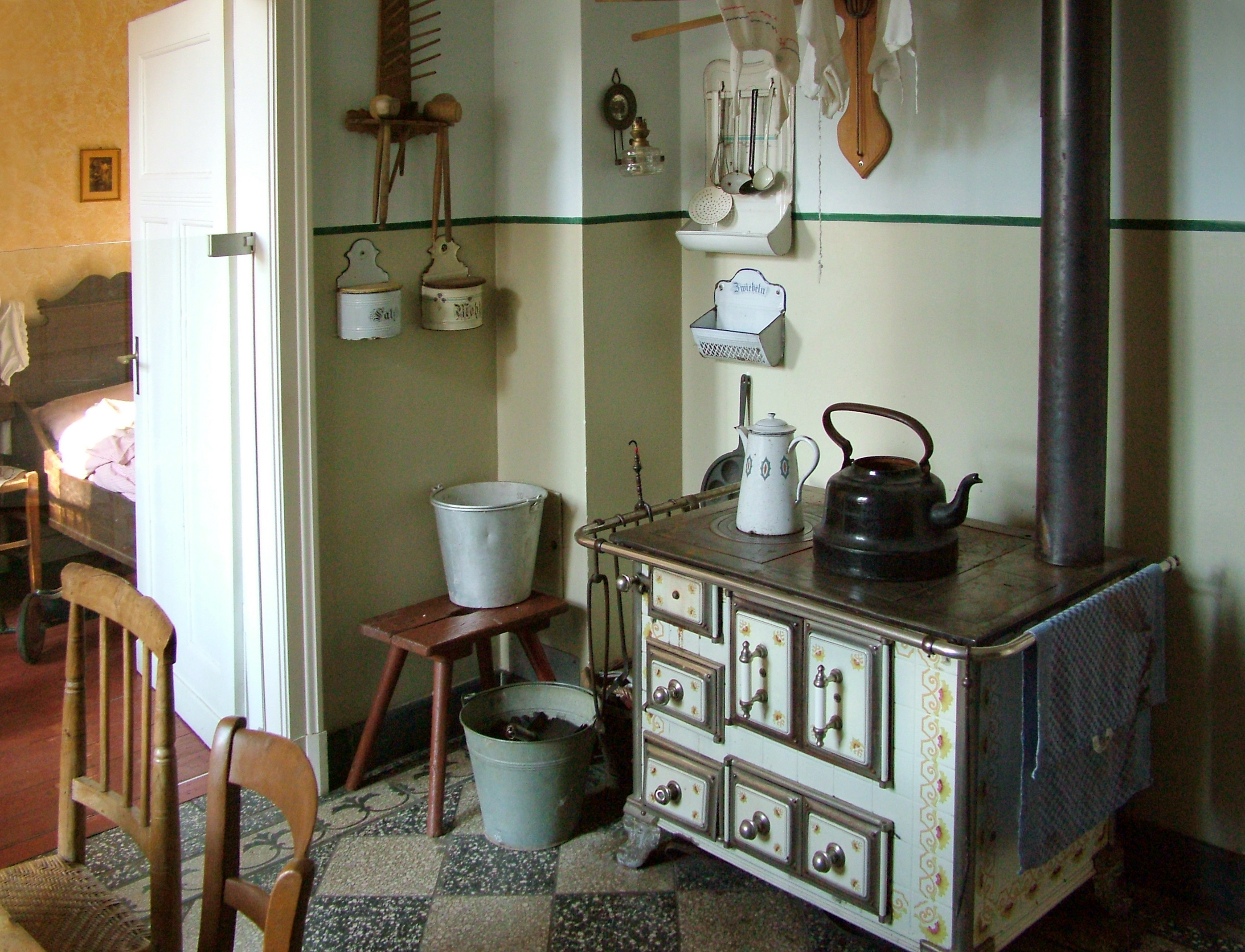 Textilmuseum Bocholt: Arbeiterwohnung, Küche